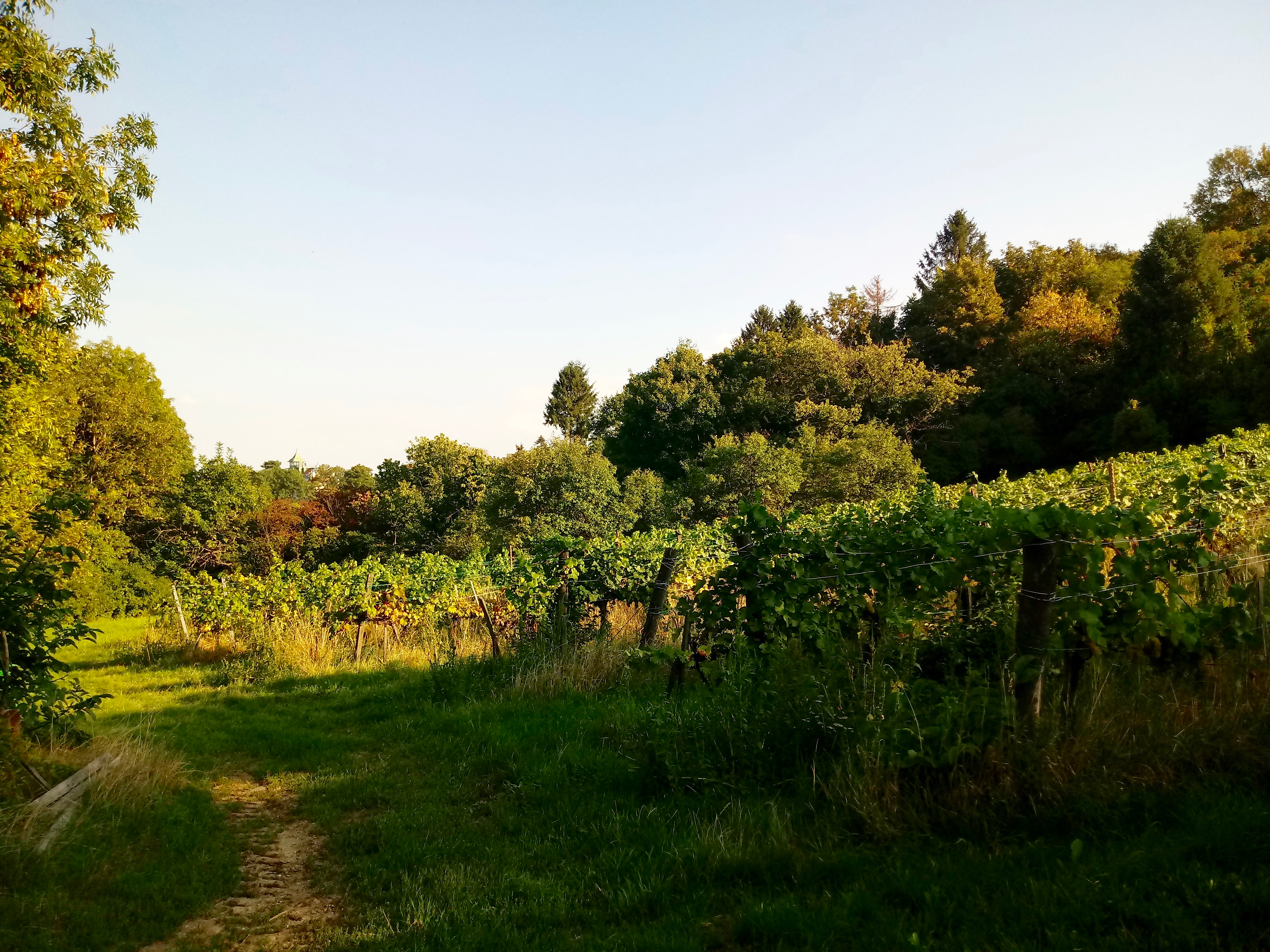 Riede Arnolzau in Wien-Grinzing.